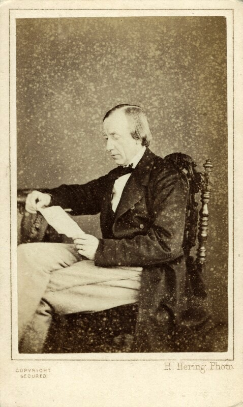 Photograph by Henry Hering